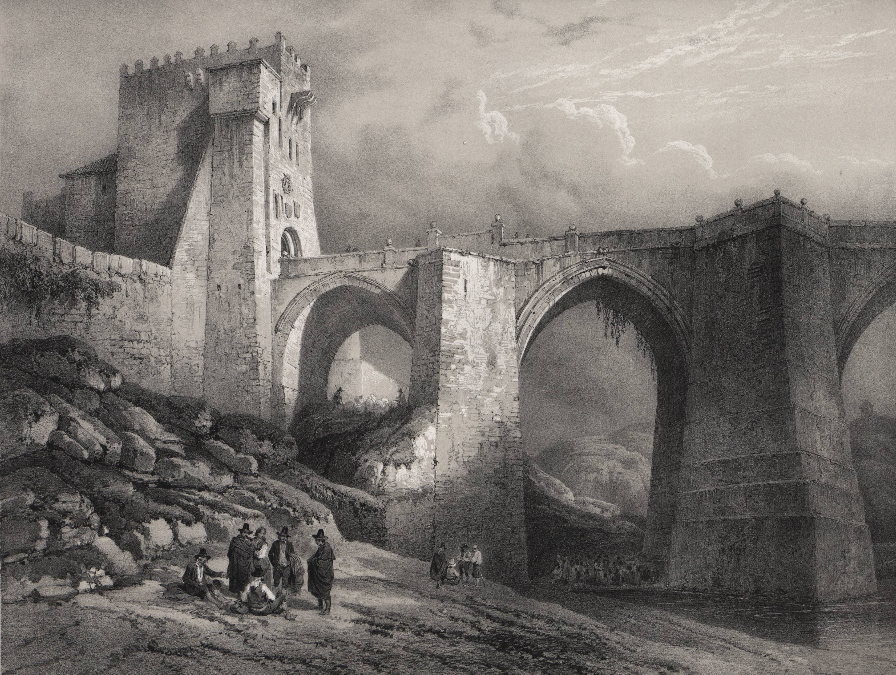 Puente de San Martín en Toledo.